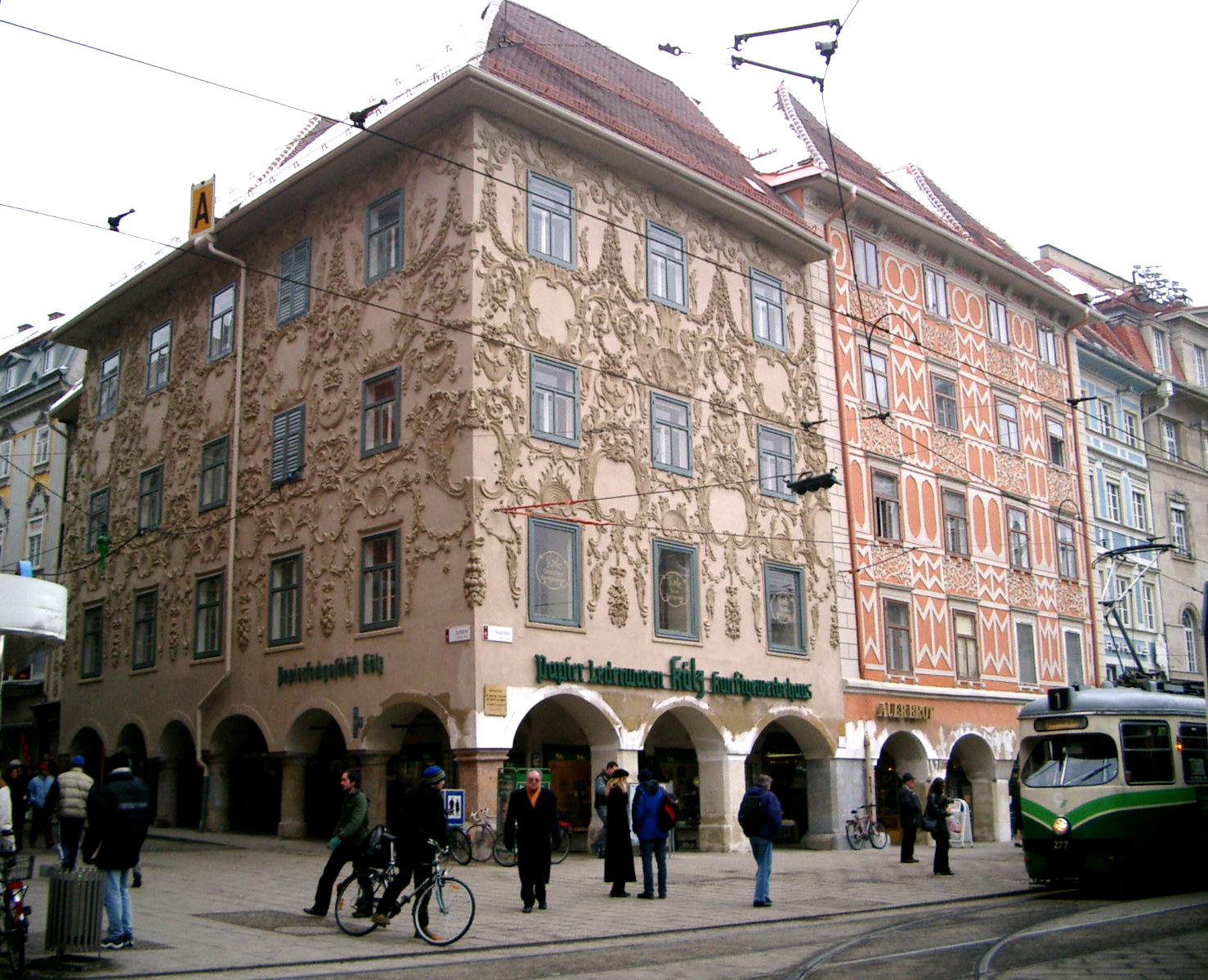 Luegg-Häuser